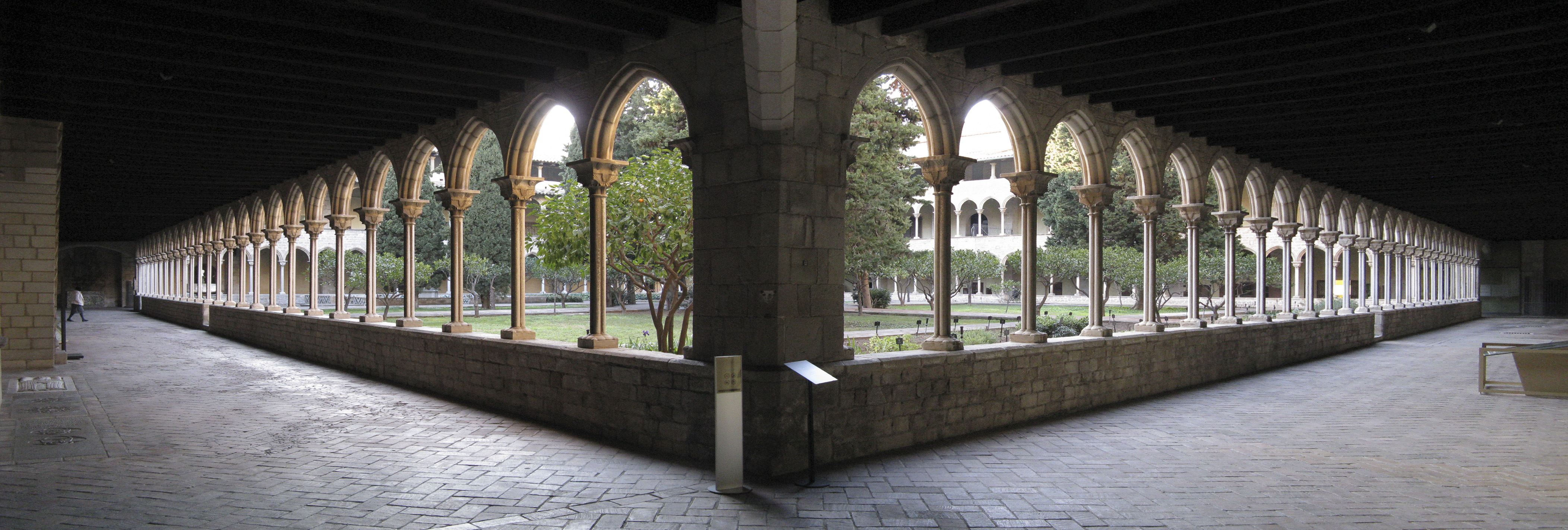 Museo-Monasterio de Pedralbes (patio interior) en Pedralbes, Barcelona, España